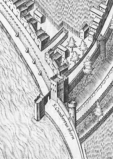 Ausschnitt des Mercator – Stadtplanes Köln. Bereich „St. Kunibert, Eckbefestigung der Stadtmauer und der Kuniberstorburg